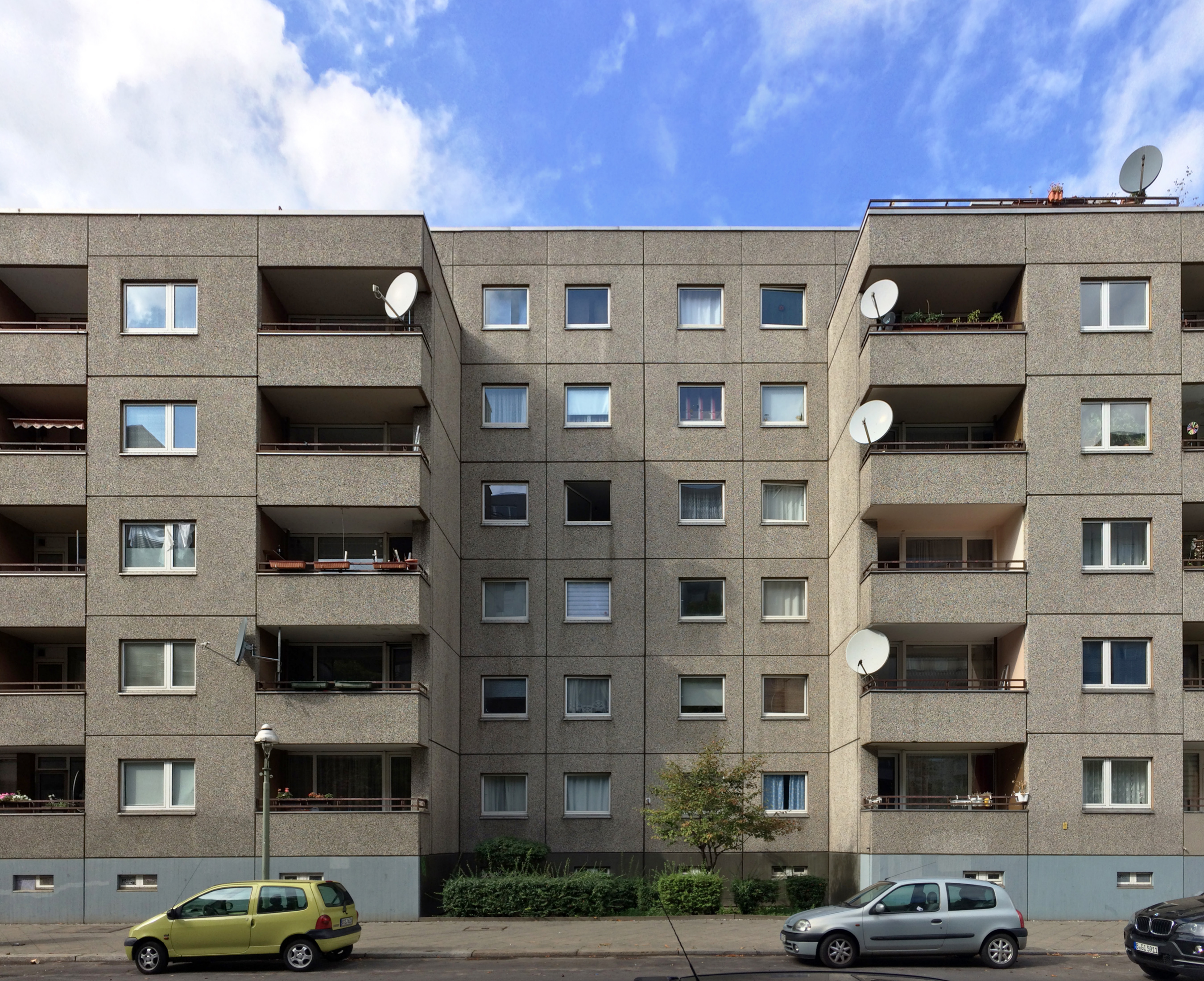 Wohnsiedlung Wassertorplatz, Erweiterung, Block 64, Bergfriedstraße, Berlin-Kreuzberg, GEWOBAG-Erneuerungsprogramm WP 1977, Werner Düttmann